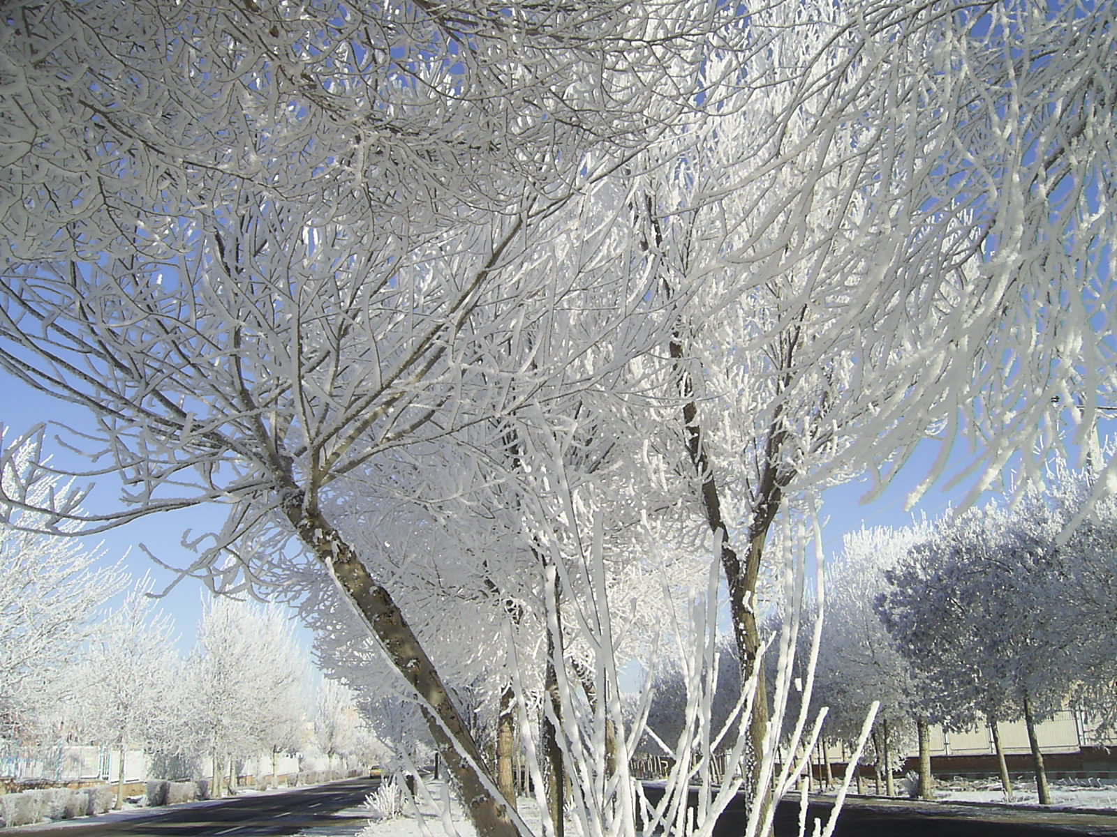 خیابان دانشگاه محقق اردبیلی در یک صبح زمستانی